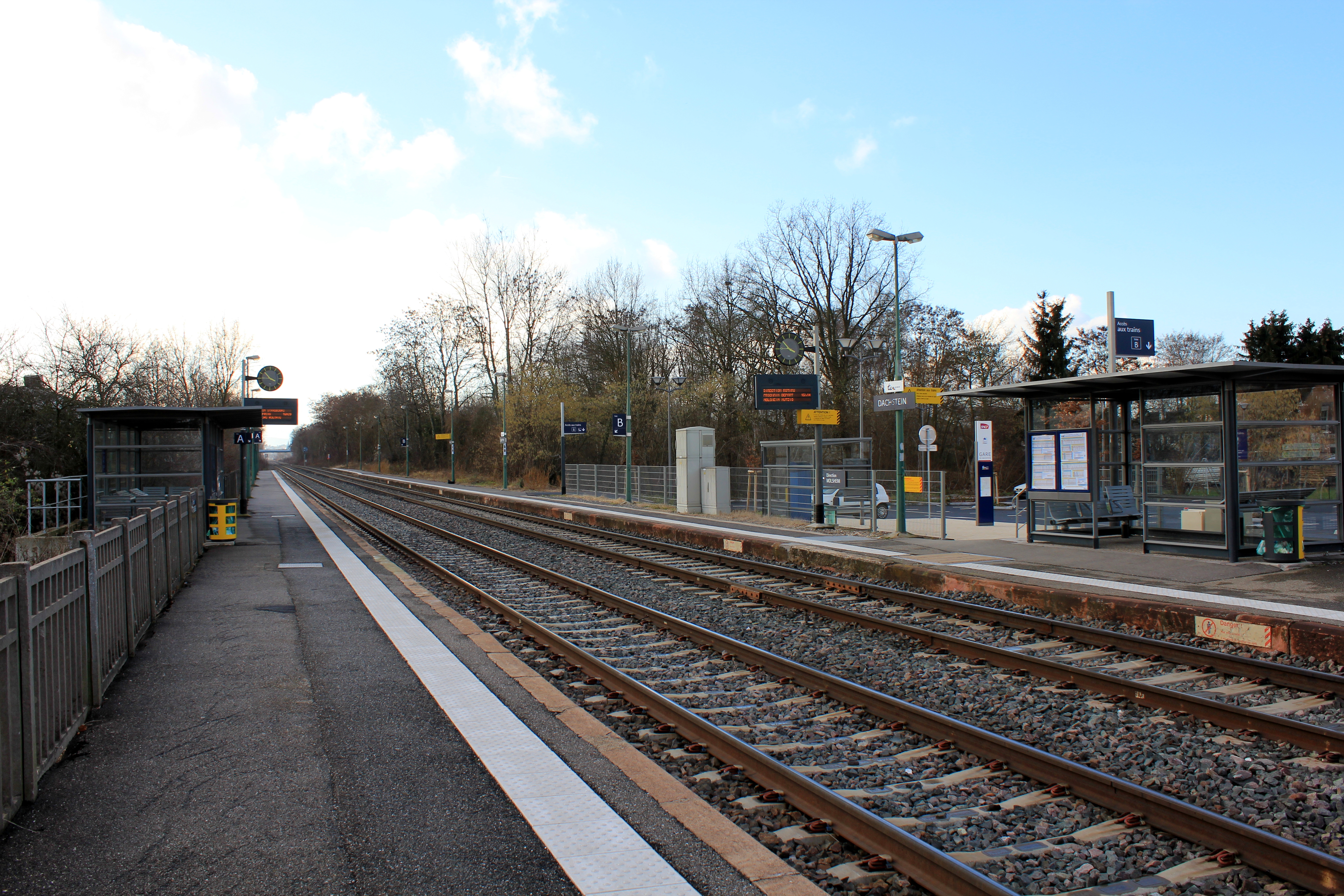 Vue générale.